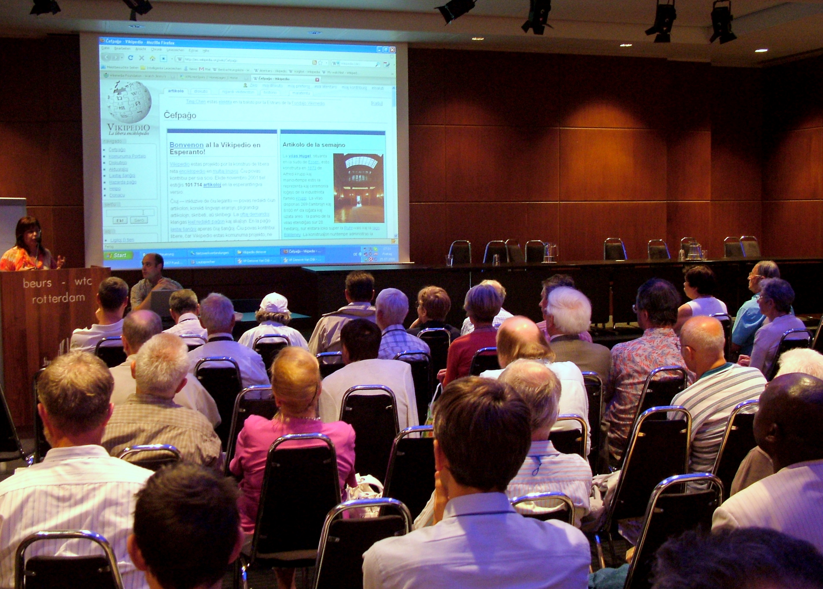 Universala Kongreso de Esperanto, Roterdamo 2008. "Vikipedio denove". Pavla Dvořáková invitas al KAEST, dum kiu okazos vikipedia trejnado.